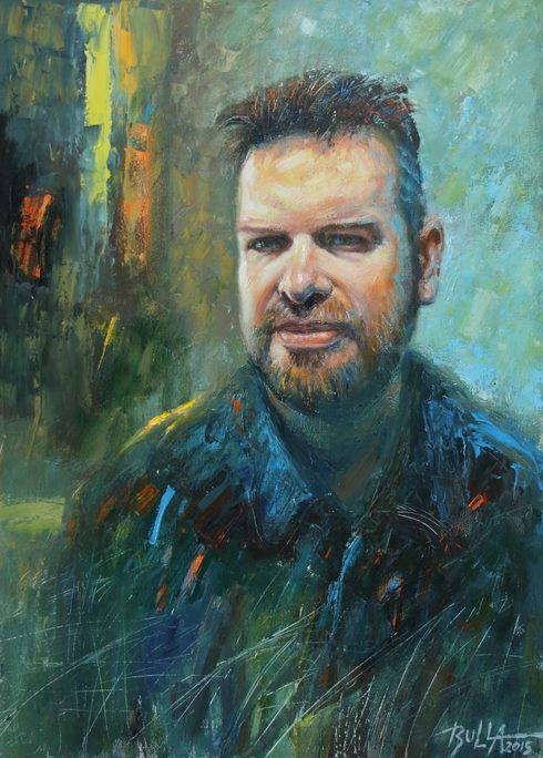 Portret Jarosława Pijarowskiego namalowany przez Ignacego Bullę- malarza